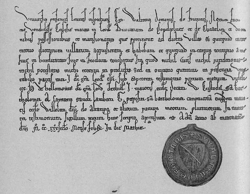 Traduction du texte "A tous ceux qui verront ces lettres. Moi, Wautier, seigneur de Fontaine, je fais connaître que j'ai vendu à la Cathédrale de Liège, l'avouerie de Ponderlues et de Chastelin, de toutes les possessions, des masuirs qui appartiennent à ces villae, de tout ce que j'avais acquis sur leur territoire et de tout ce que j'y tenais soit en propriété, soit en fief. C'est pourquoi je ne me suis réservé dans ces dites villae, aucun droit, aucune juridiction, aucun pouvoir, mais j'ai tout abandonné en présence de mon vénérable père, Jean d'Aps, évéque de Liège, par la grâce de Dieu, avec le témoignage de mes pairs : H. de Beaumont, archidiacre, J., chanoine de la cathédrale, W., gardien de Saint-Barthélemy, A., chantre de Saint-Lambert, G., prévôt de Saint-Barthélemy, chanoine de la môme grande Eglise, Guillaume, seigneur de Haute-Rive et plusieurs autres de mes pairs. En témoignage de quoi, mon sceau a été appendu à cet acte. Fait l'année de l'incarnation du Seigneur, mil deux cent trente-deux, le mois de février, le jour de Mathieu."